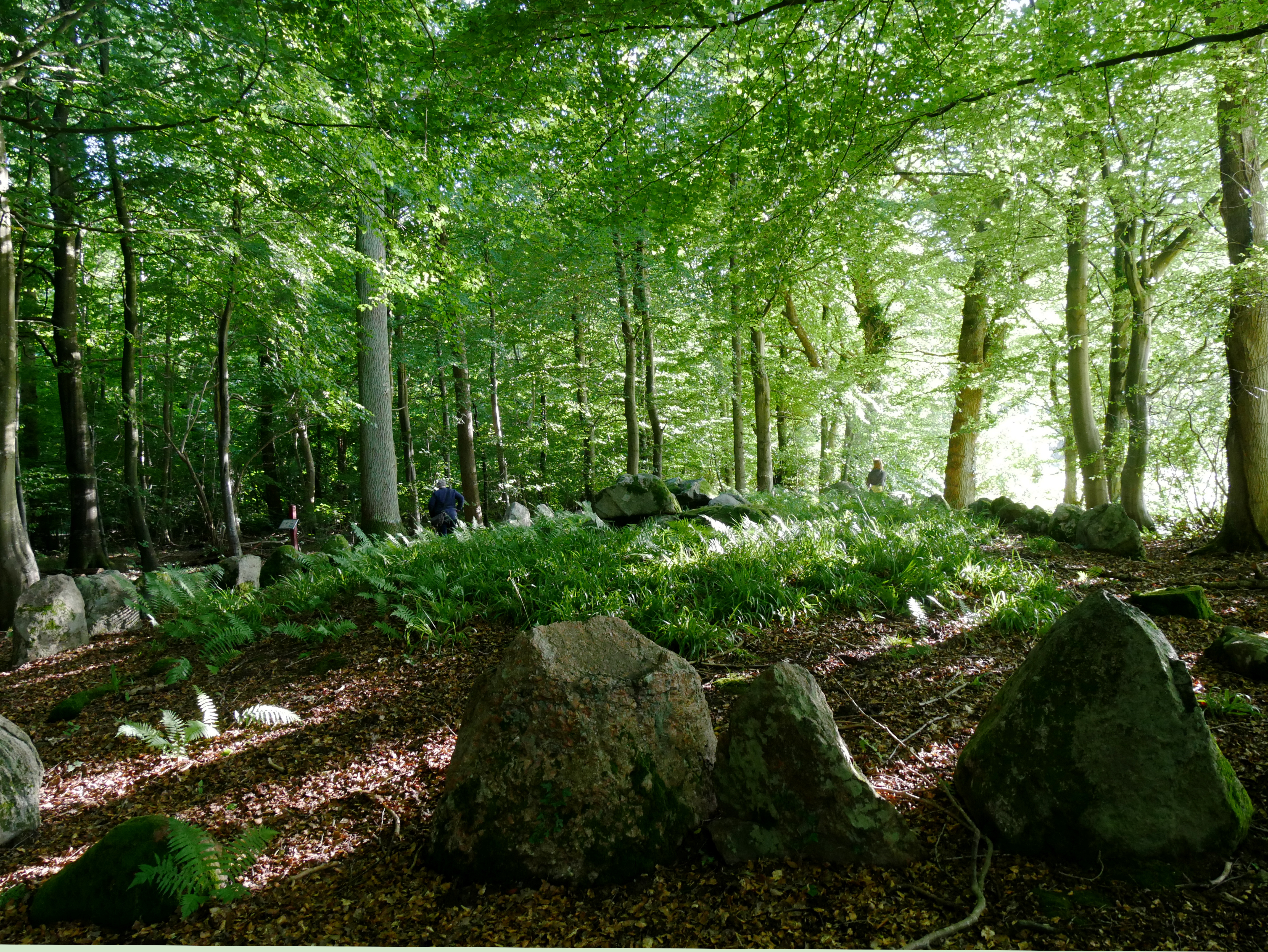 Der Langdysse von Sønder Stenderup (auch Midtskov Afdl. 82 genannt) liegt im Midtskov (mittlerer Wald), östlich von Kolding in Jütland in Dänemark. Er stammt aus der Jungsteinzeit etwa 3500 bis 2800 v. Chr. und ist eine Megalithanlage der Trichterbecherkultur (TBK). Das etwa einen Meter hohe Nordwest-Südost orientierte Hünenbett des Langdysse mit zwei querliegenden, 1942 restaurierten Dolmenkammern ist etwa 21,0 m lang und 9,0 m breit. Die Randsteine (38) sind nahezu vollständig erhalten. Die Kammern haben beide die gleiche Form. Ein Endstein im Norden, zwei seitliche Tragsteine im Osten und Westen, zwei Gangsteinpaare (ohne Decksteine) und ein Deckstein auf der Kammer.